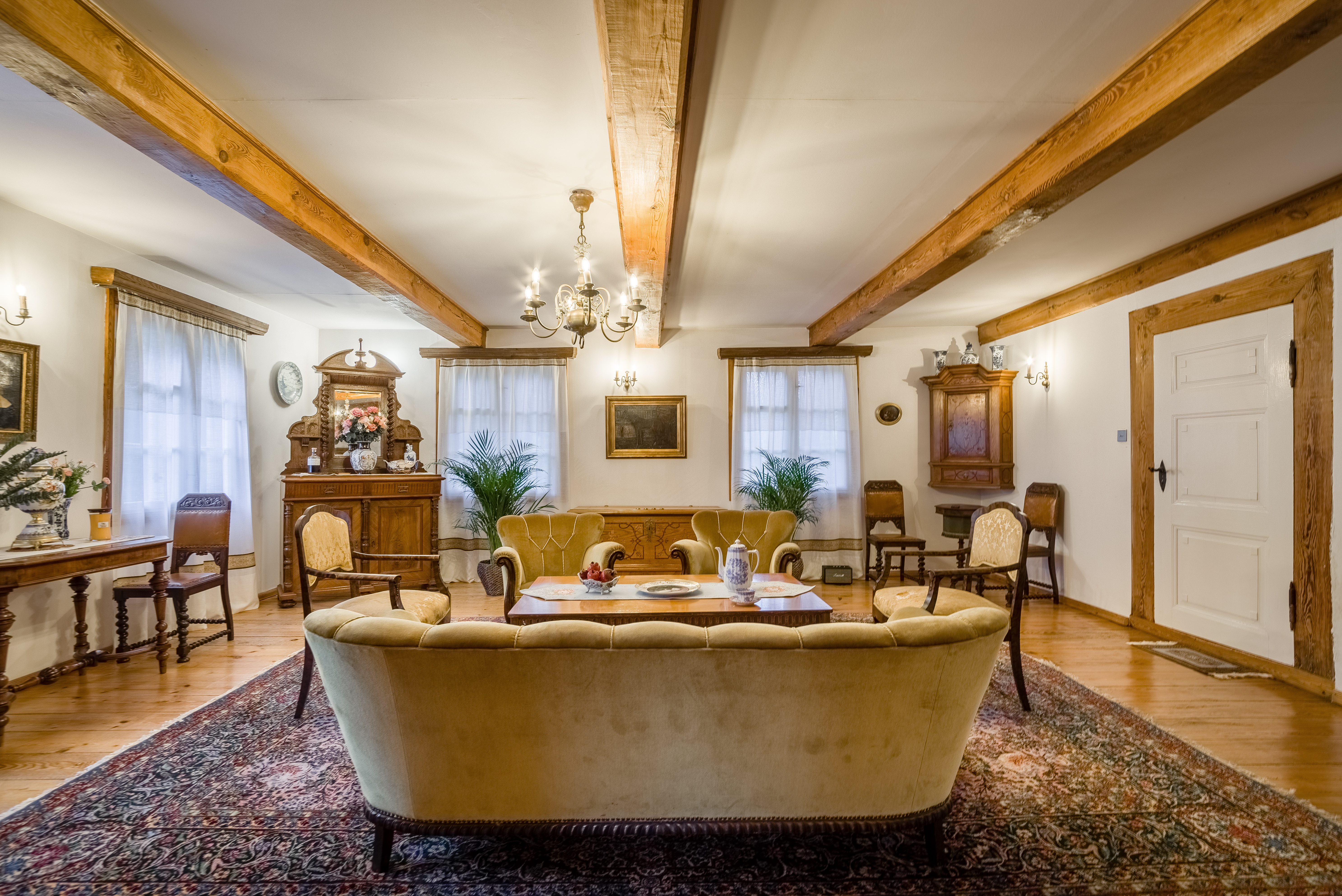 Wielka Izba domu podcieniowego nr 6 w Żuławkach